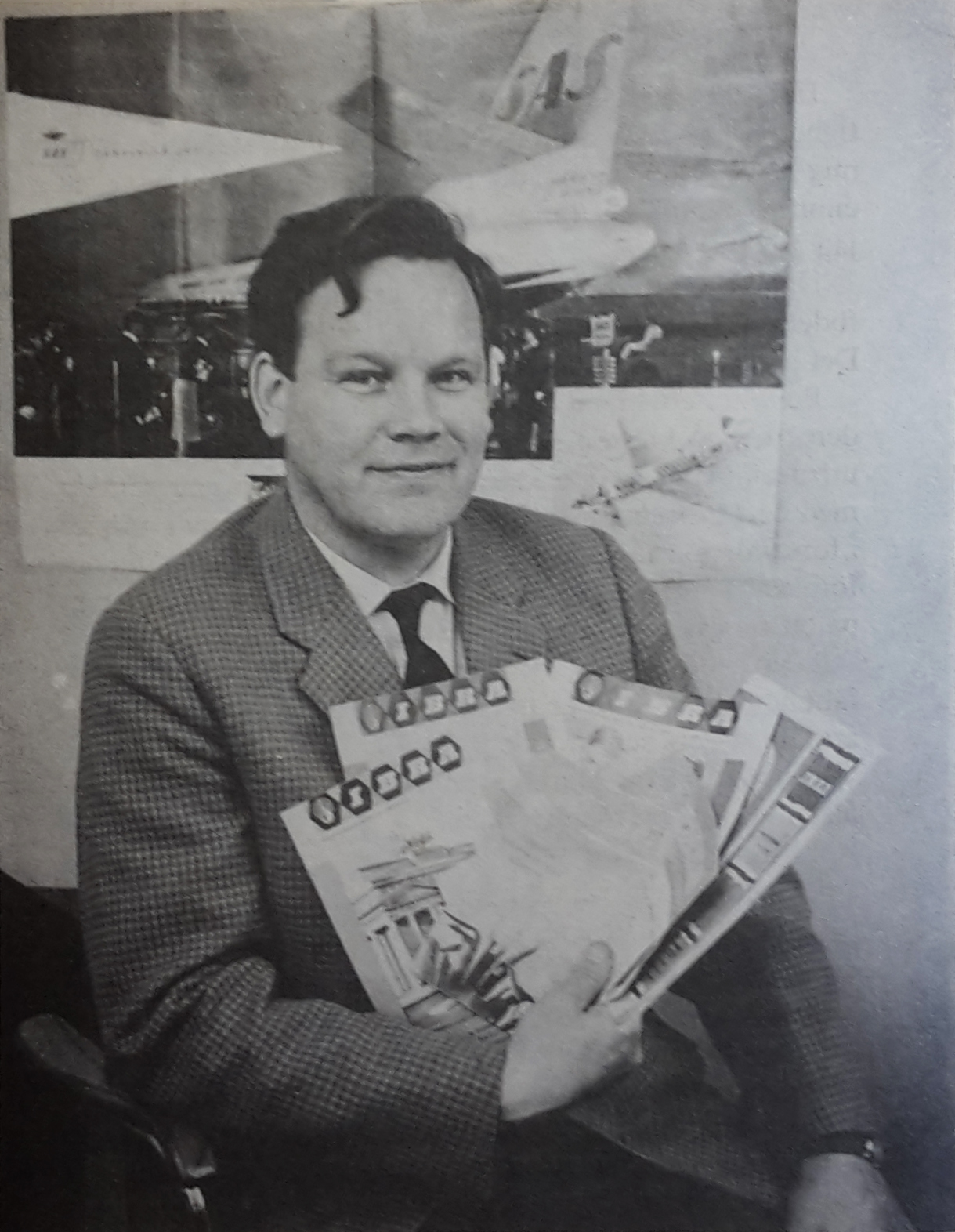 Journalisten och missionären Erik Martinsson som redaktör på IBRA-tidningen.